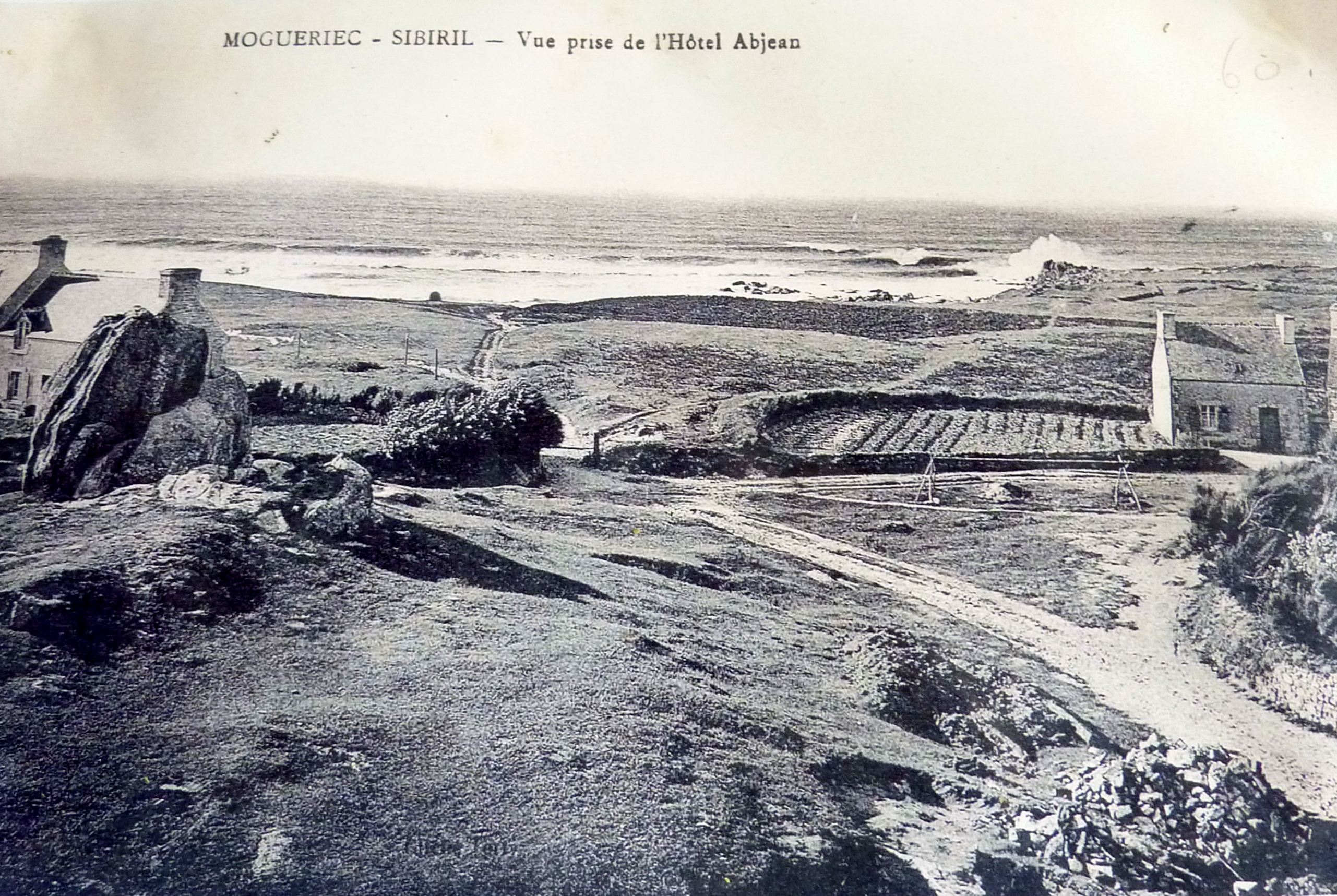 Moguériec vers 1900 ; vue prise de l'hôtel Abjean (carte postale)